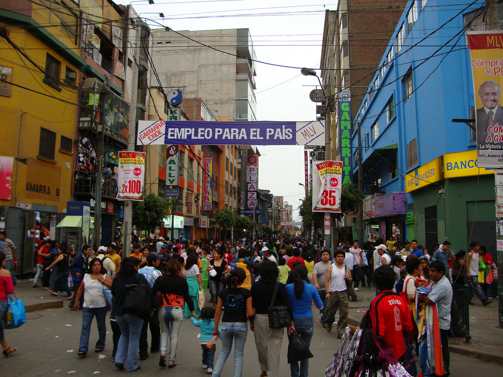 Avenida Agustín Gamarra, Einkaufsstraße in Lima